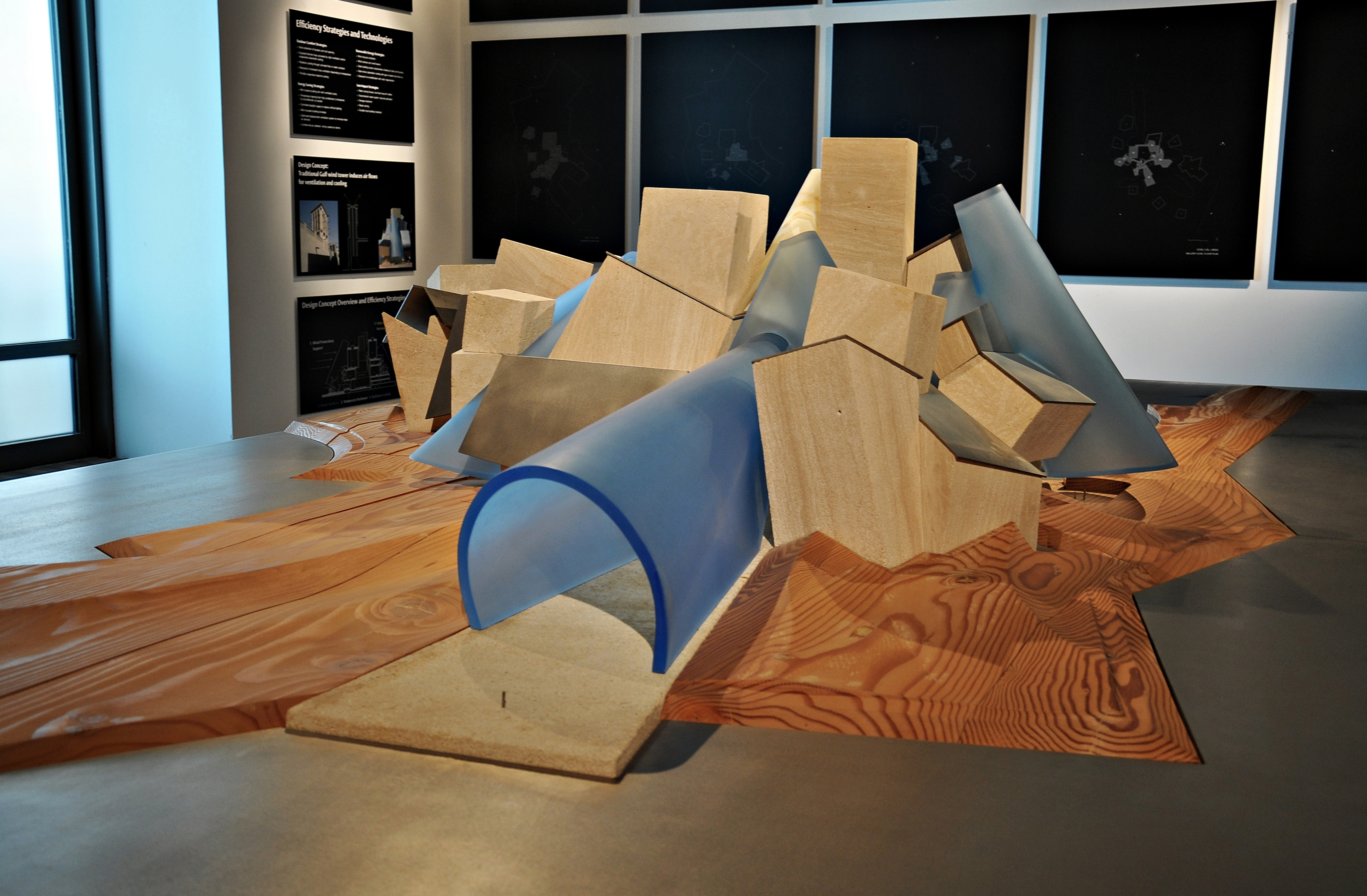 emiratos arabes